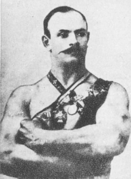 Władysław Pytlasiński, mistrz w zapasach